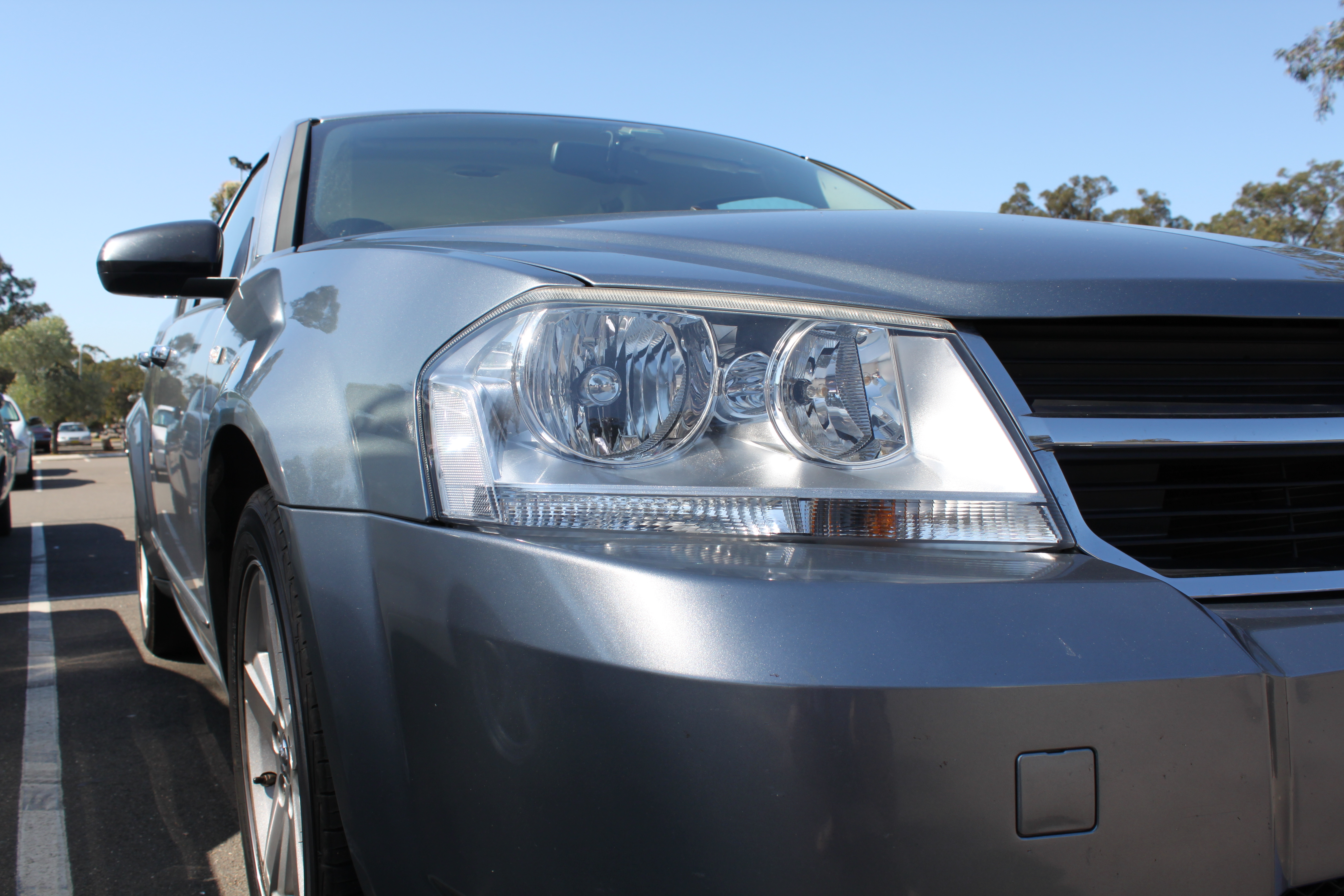 Dodge Avenger